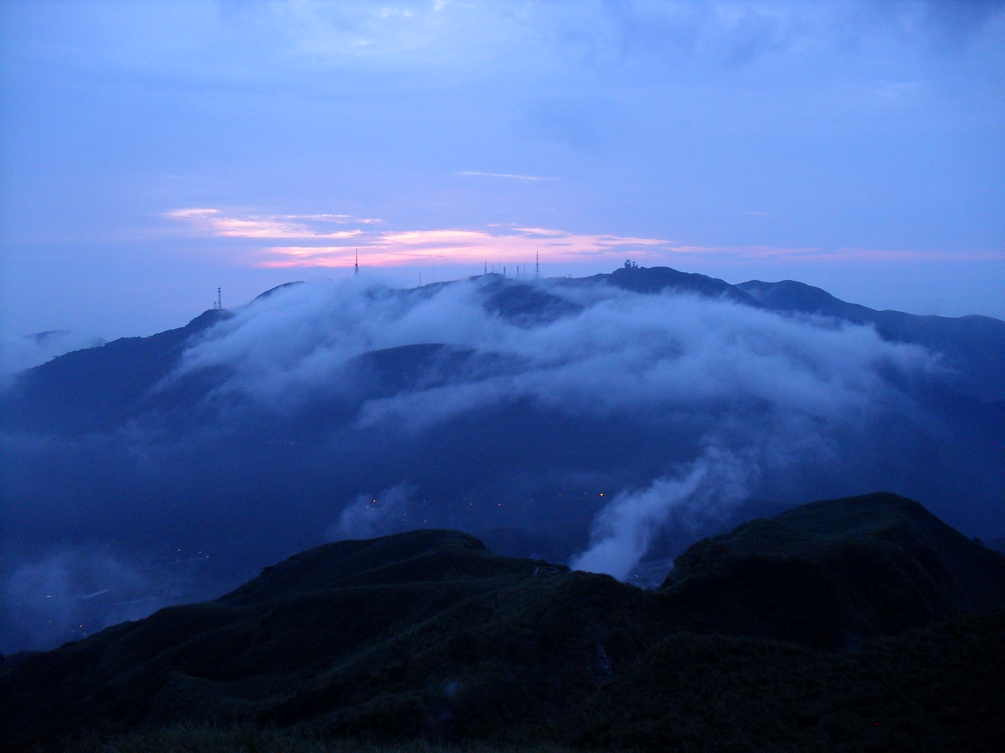 Bân-lâm-gú: 日頭落山了的小觀音山。